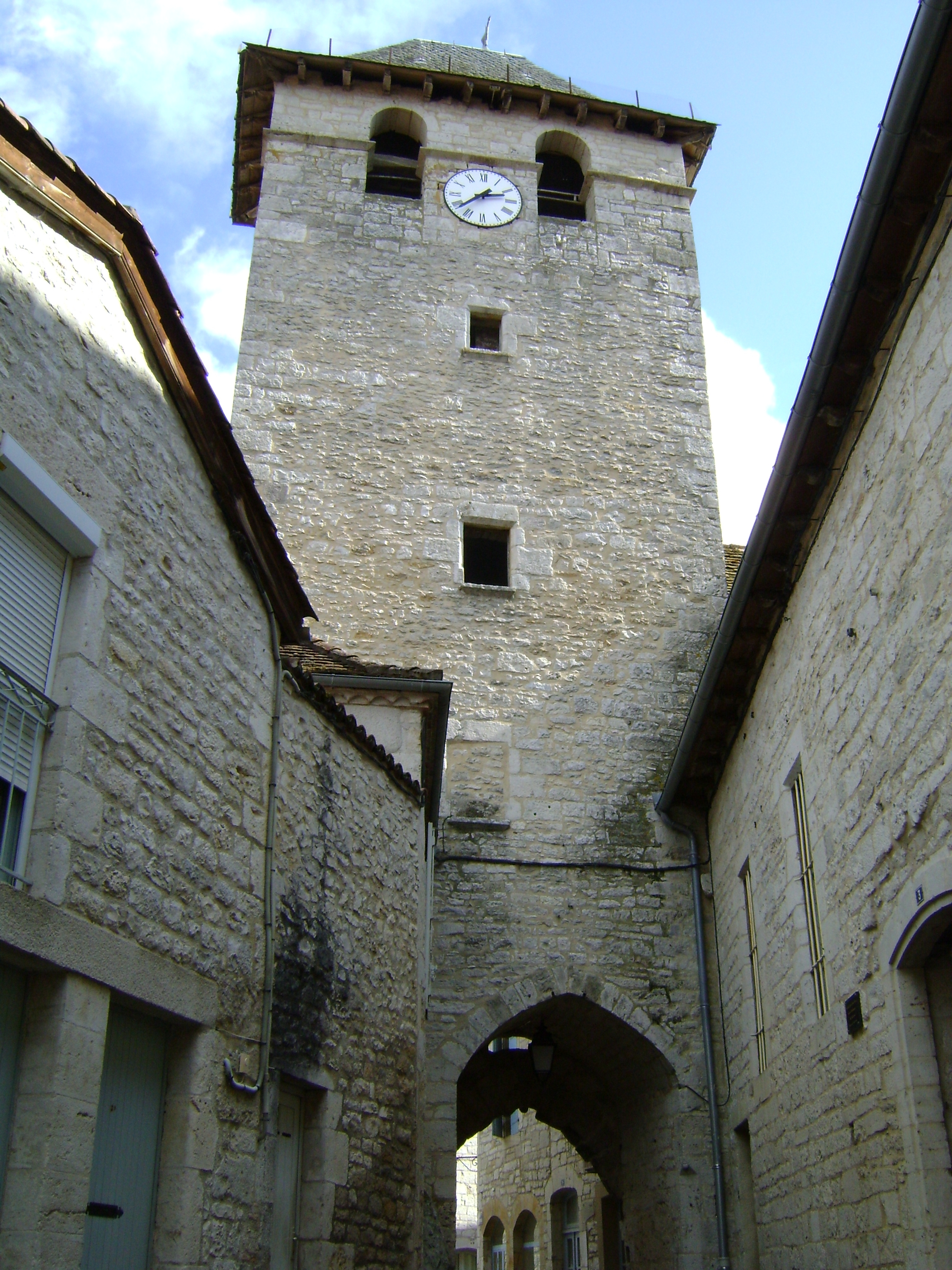 La Tour de l'Horloge de Gramat, Lot, France, le matin du 3 octobre 2008.